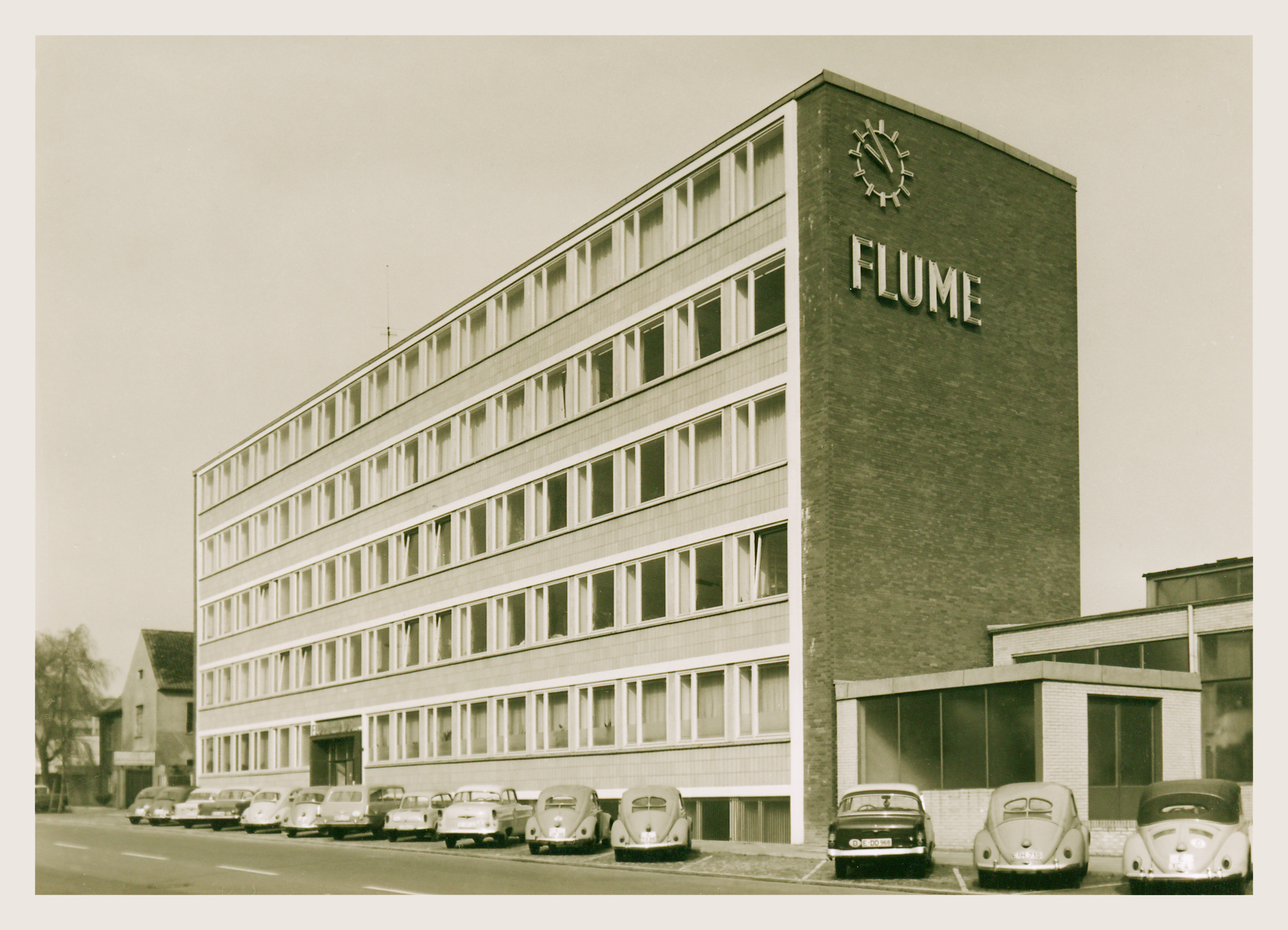 Das Flume-Gebäude seit 1961 in Essen